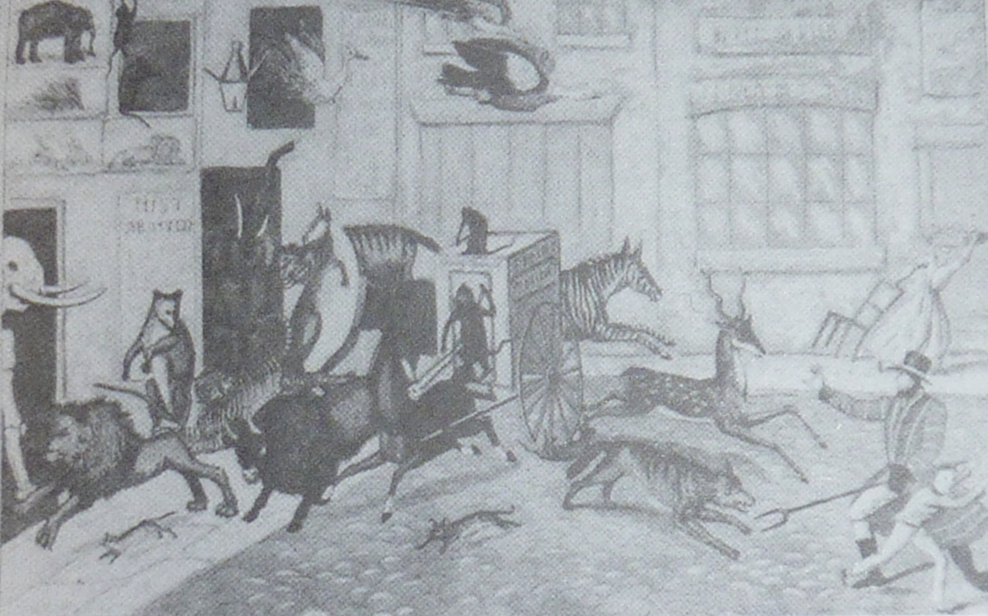 Edward Cross' Tiere entkommen beim Umzug seiner Menagerie. Am linken Bildrand das Skelett des Elefanten Chunee. Zeitgenössische Radierung.